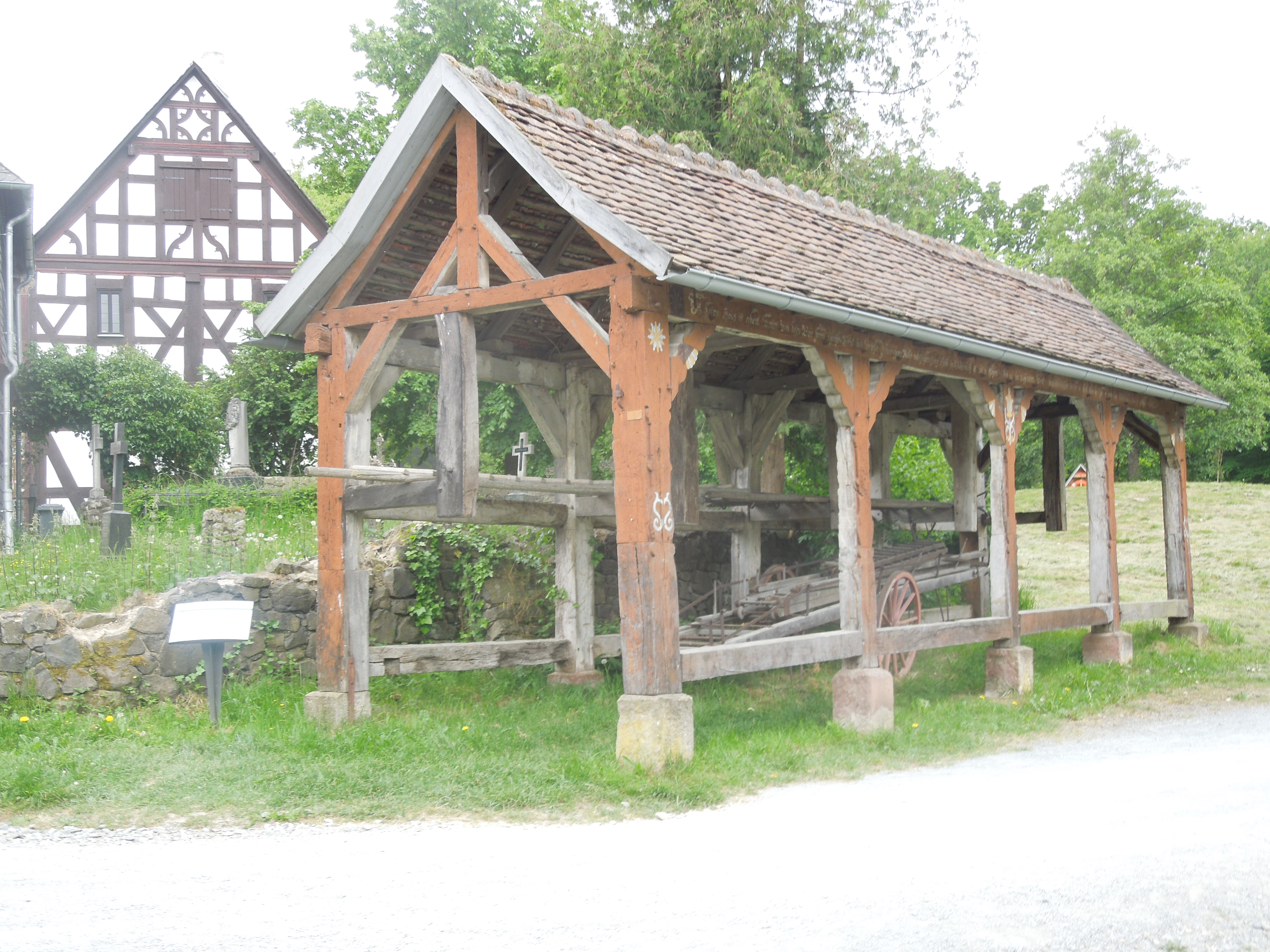 Altes Leiterhaus von Mudersbach (Hohenahr), heute im Hessenpark